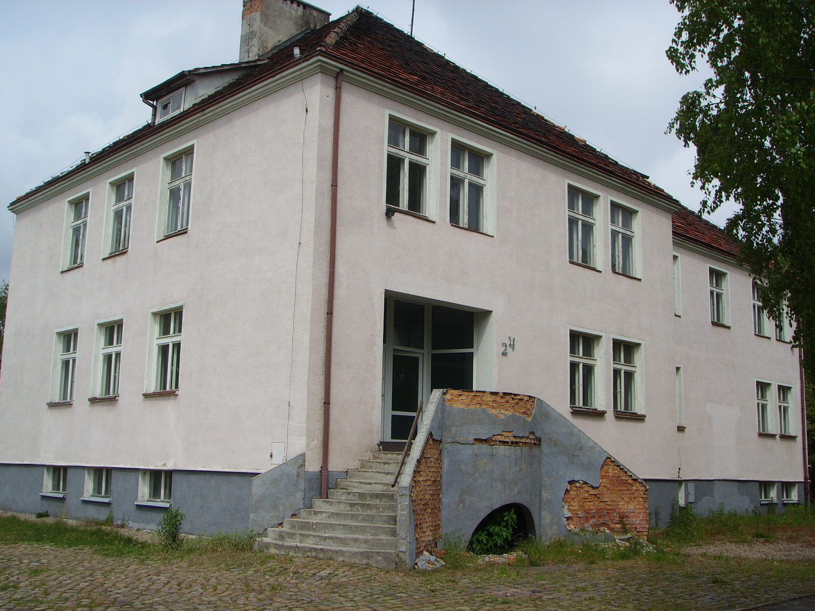 Byłe koszary strażnicy Kujaty WOP w Szczecinie (ul. Kujaty)